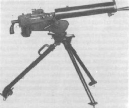 Podstawa wz. 1934 z ciężkim karabinem maszynowym wz. 1930. [opis oryginalny]